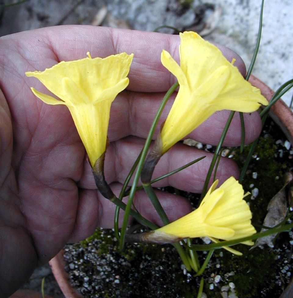 Narcissus blancoi Barra & G. López. Real Jardín Botánico, Madrid.